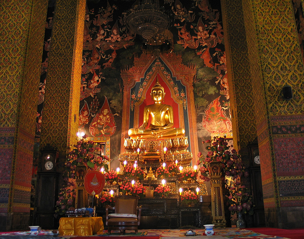 Presiding Buddha image, ubosoth in Wat Jakkrawat, Bangkok, Thailand.